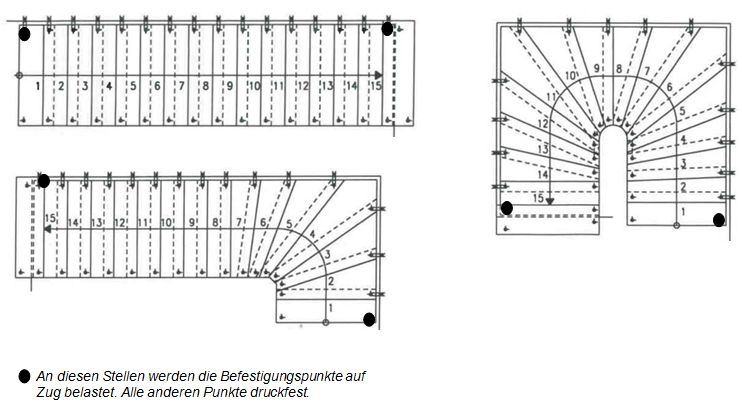 Beispiel für Zugbelastung auf die An- und Austrittsstufe